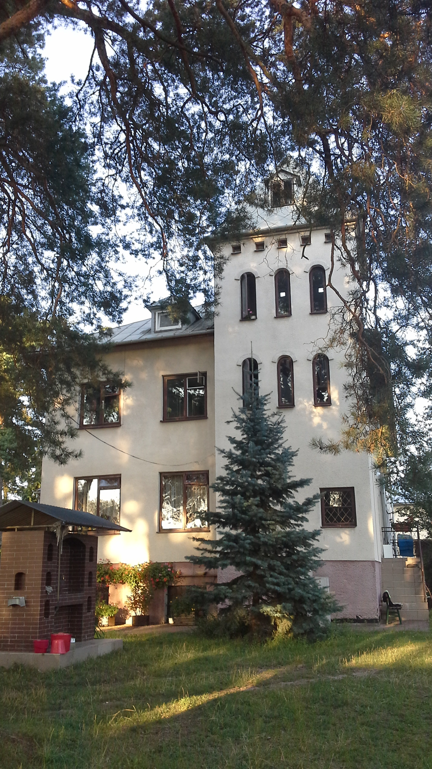 Murowany budynek klasztorny na Świętej Górze Grabarce